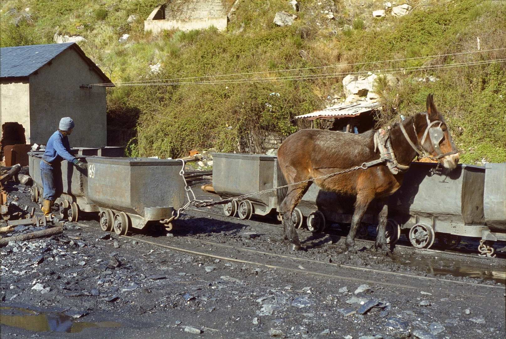 Manœuvre de berlines à l'aide d'un cheval, dans une exploitation minière à Santa Cruz del Sil en 1983.